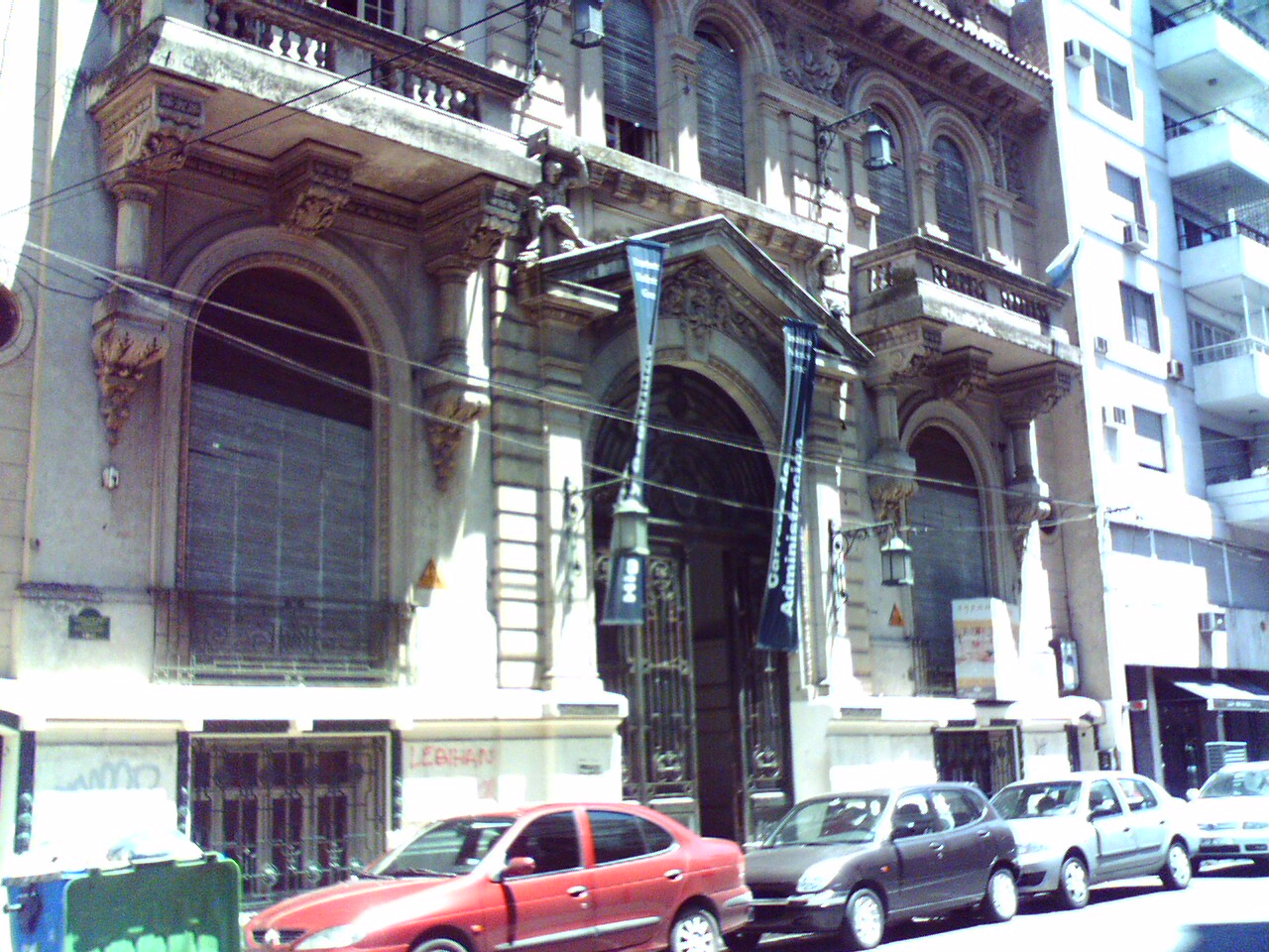 Vista al año 2008 del ex cine Rose Marie (Rosario)